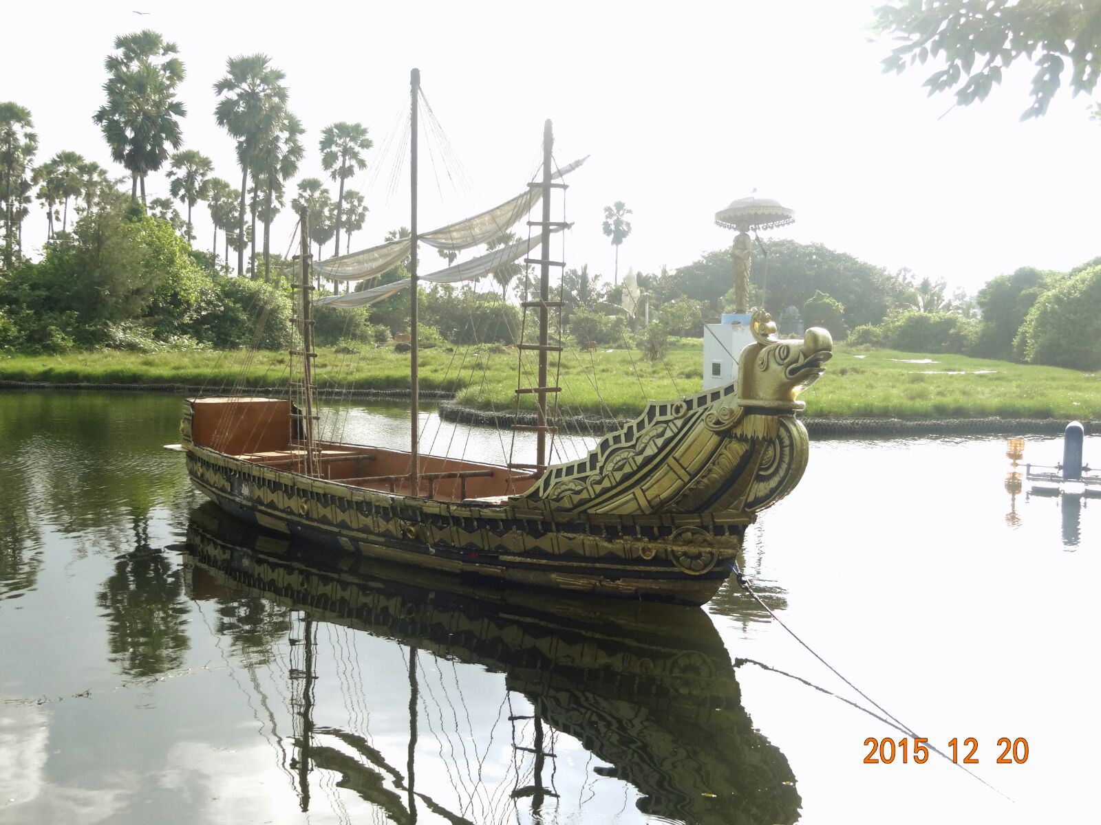 மரக்கலம்